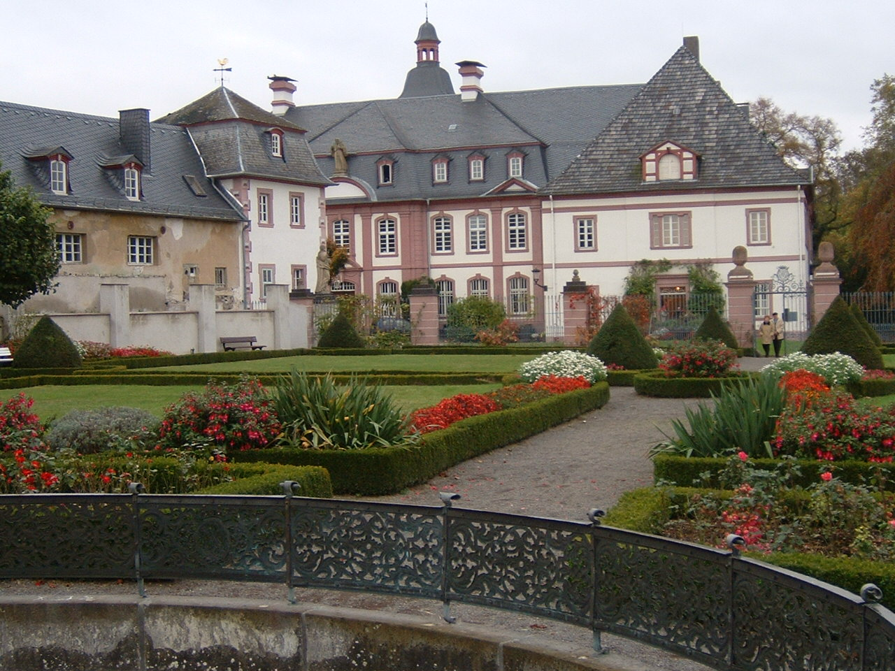 Abtei Rommersdorf/Neuwied F.Lang eigenes Bild